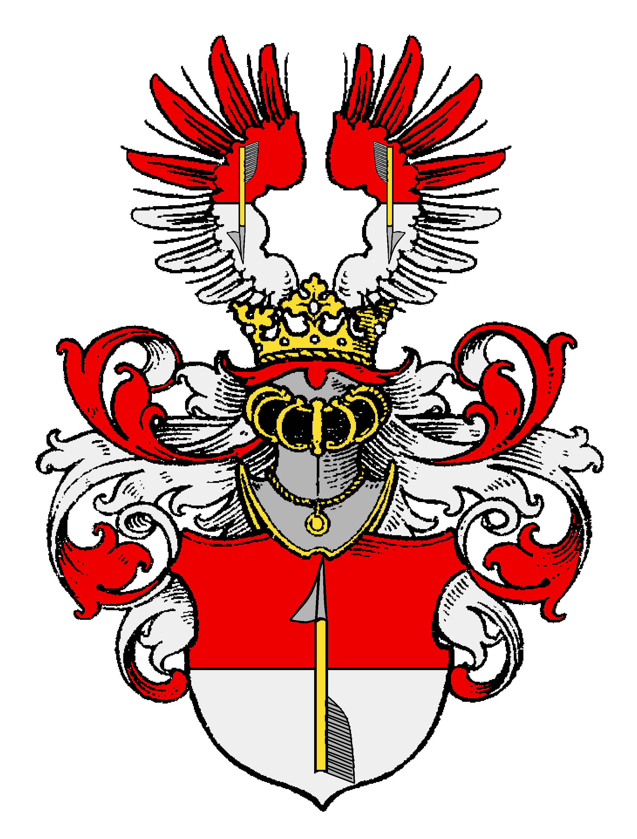 Stammwappen der Thanrädl, altes salzburgisches Geschlecht, das im 16. Jahrhundert in den Freiherrnstand erhoben wurden und unter Maximilian I. nach Österreich kam.